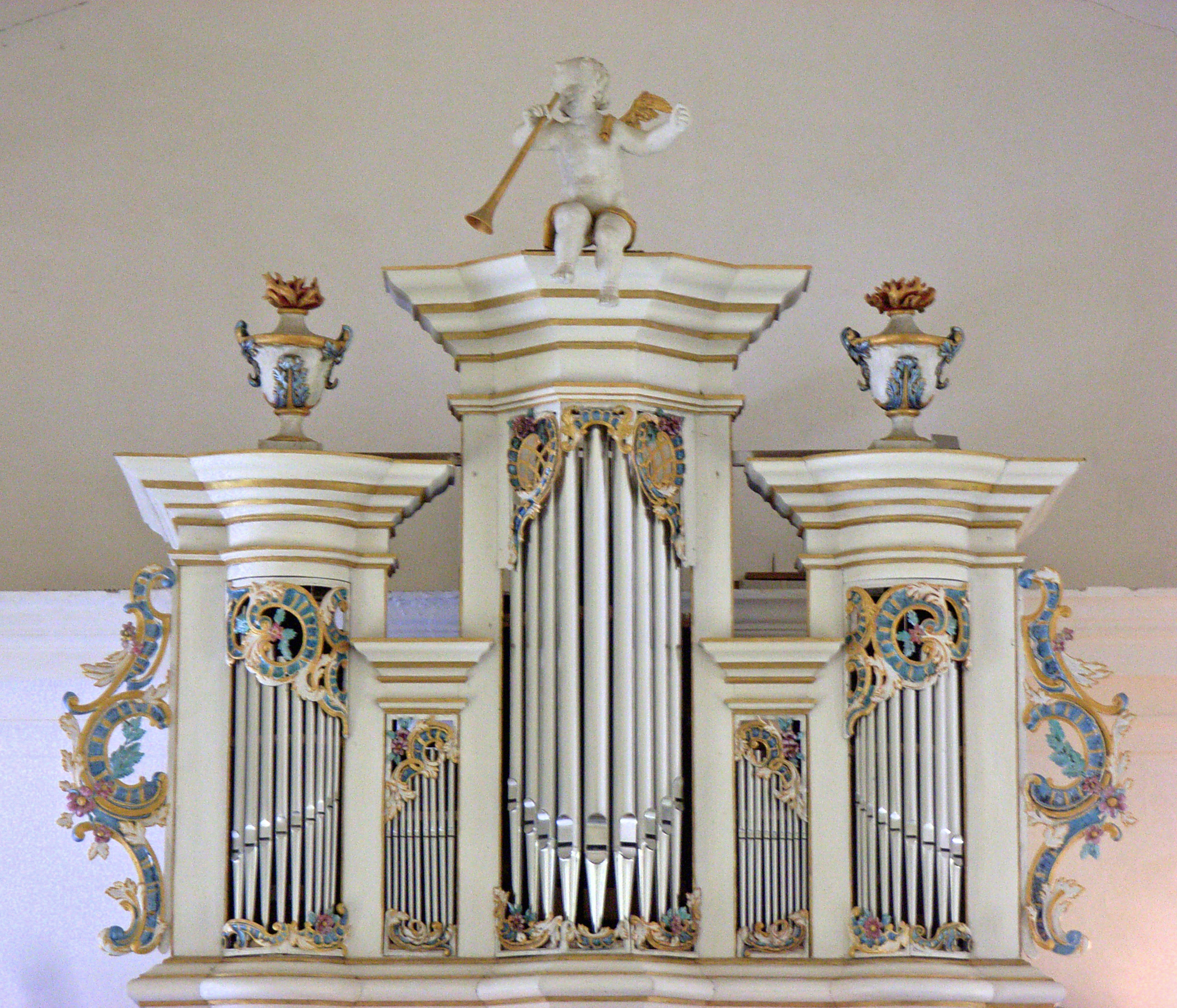 Orgel in Warlitz, St. Trinitatis